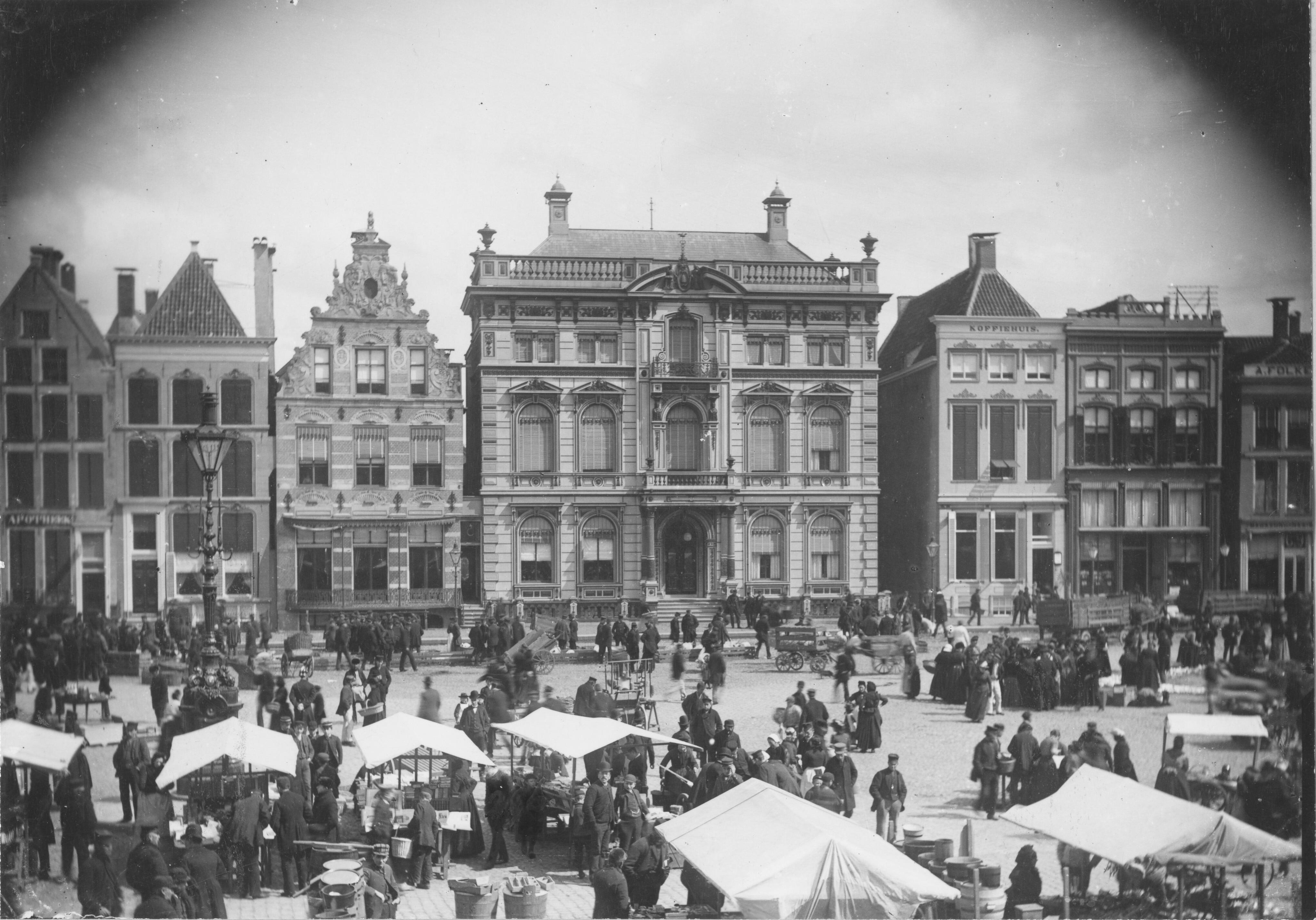 Scholtenshuis (verwoest in 1945) met de markt op de voorgrond.